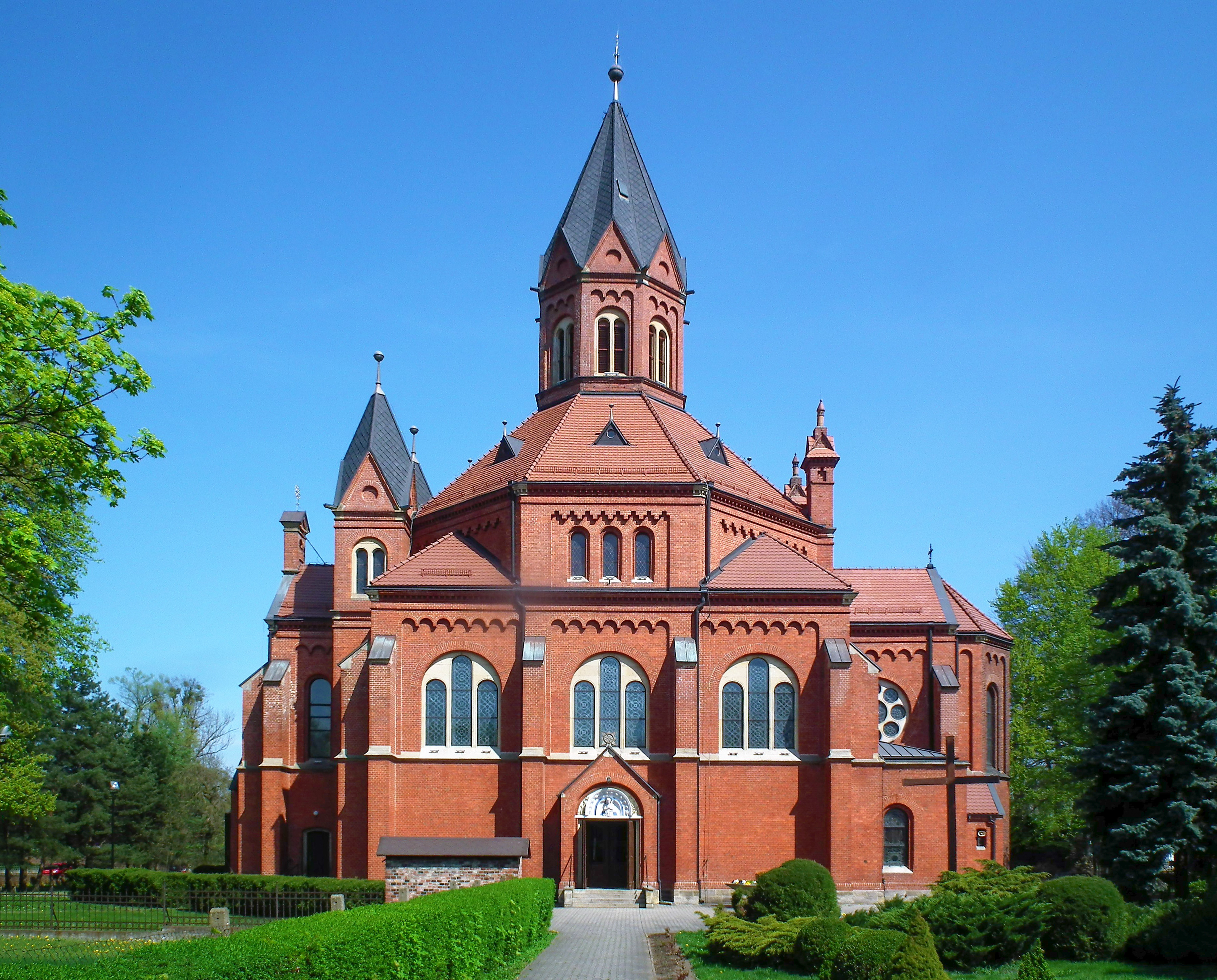 Kościół Najświętszego Serca Pana Jezusa w Nakle Śląskim.